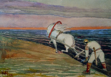 Kalevipoeg kündmas. Akvarell.